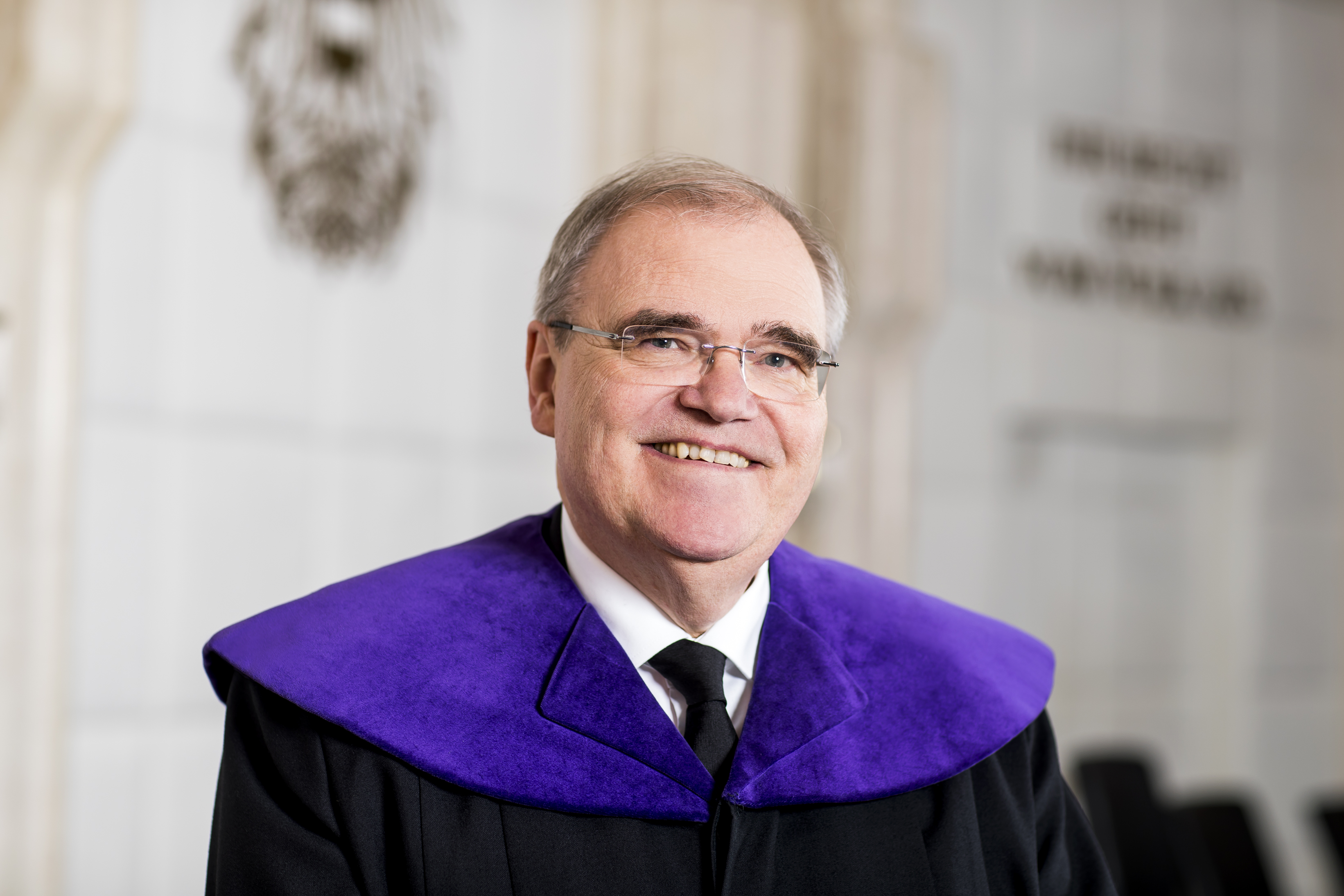 Dr. Wolfgang Brandstetter, Mitglied des österreichischen Verfassungsgerichtshofs seit 2018.